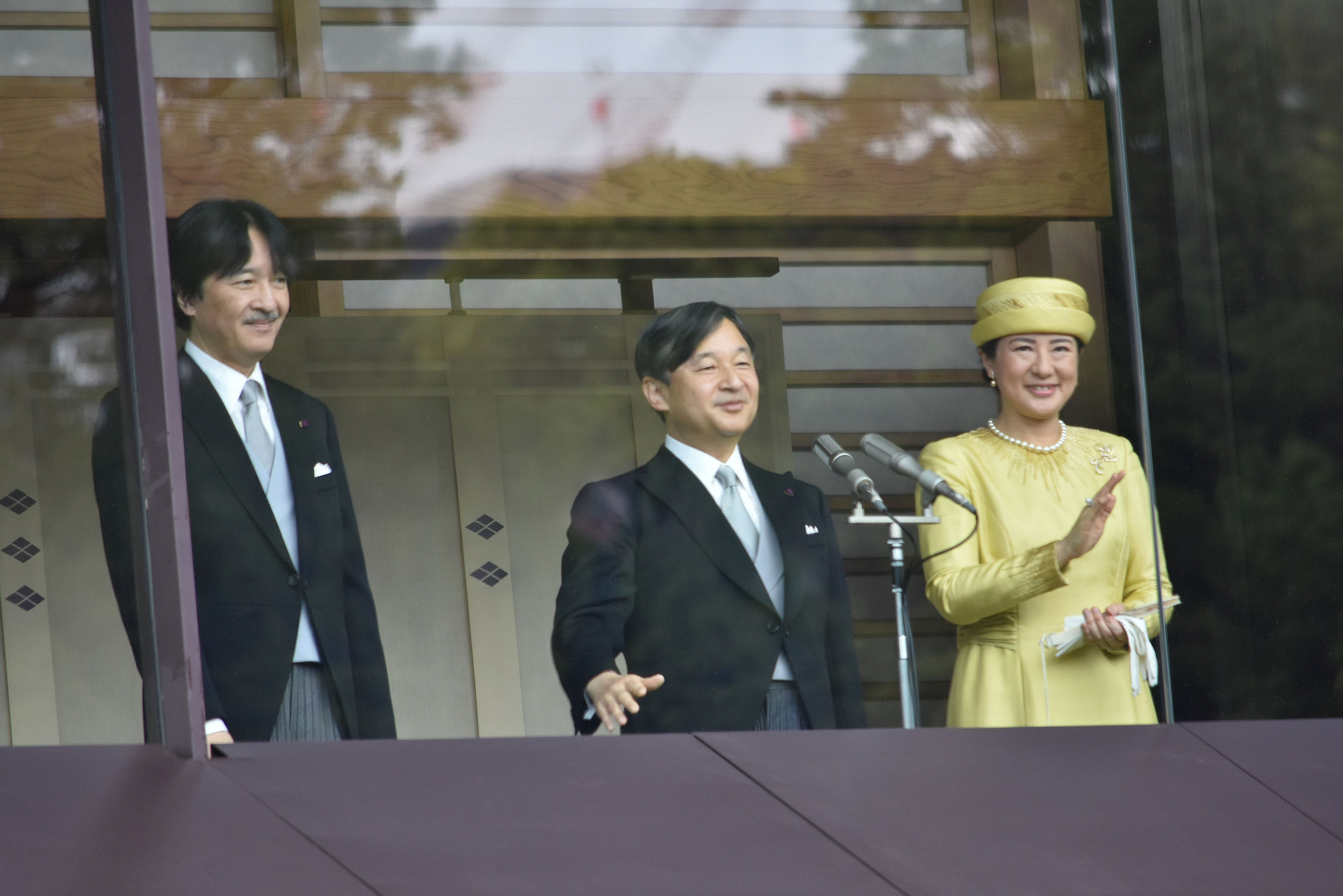 徳仁天皇陛下 Nikon D3400